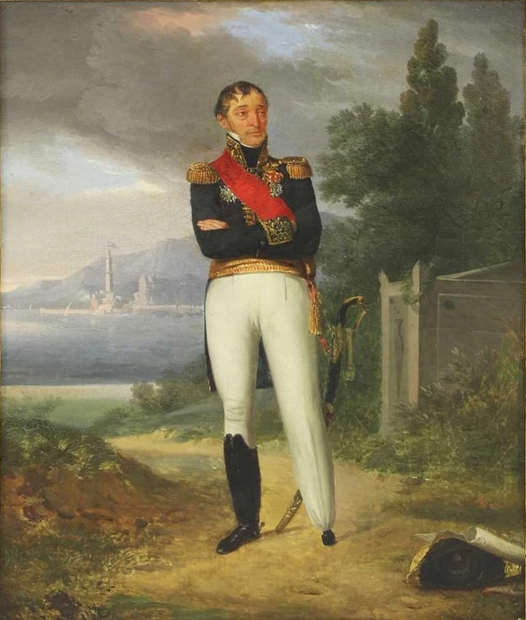 Jacques Darnaud (8 janvier 1758, Bricy-le-Boulay (Loiret) - 3 mars 1830, Paris) général du Premier Empire.